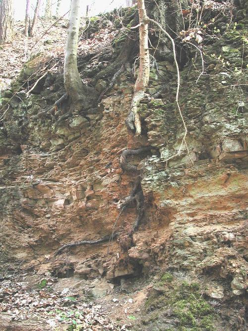 Ehemaliger Keupersteinbruch bei Heilbronn. Das Bild zeigt die Übergangszone zwischen dem Gipskeuper und dem Schilfsandstein